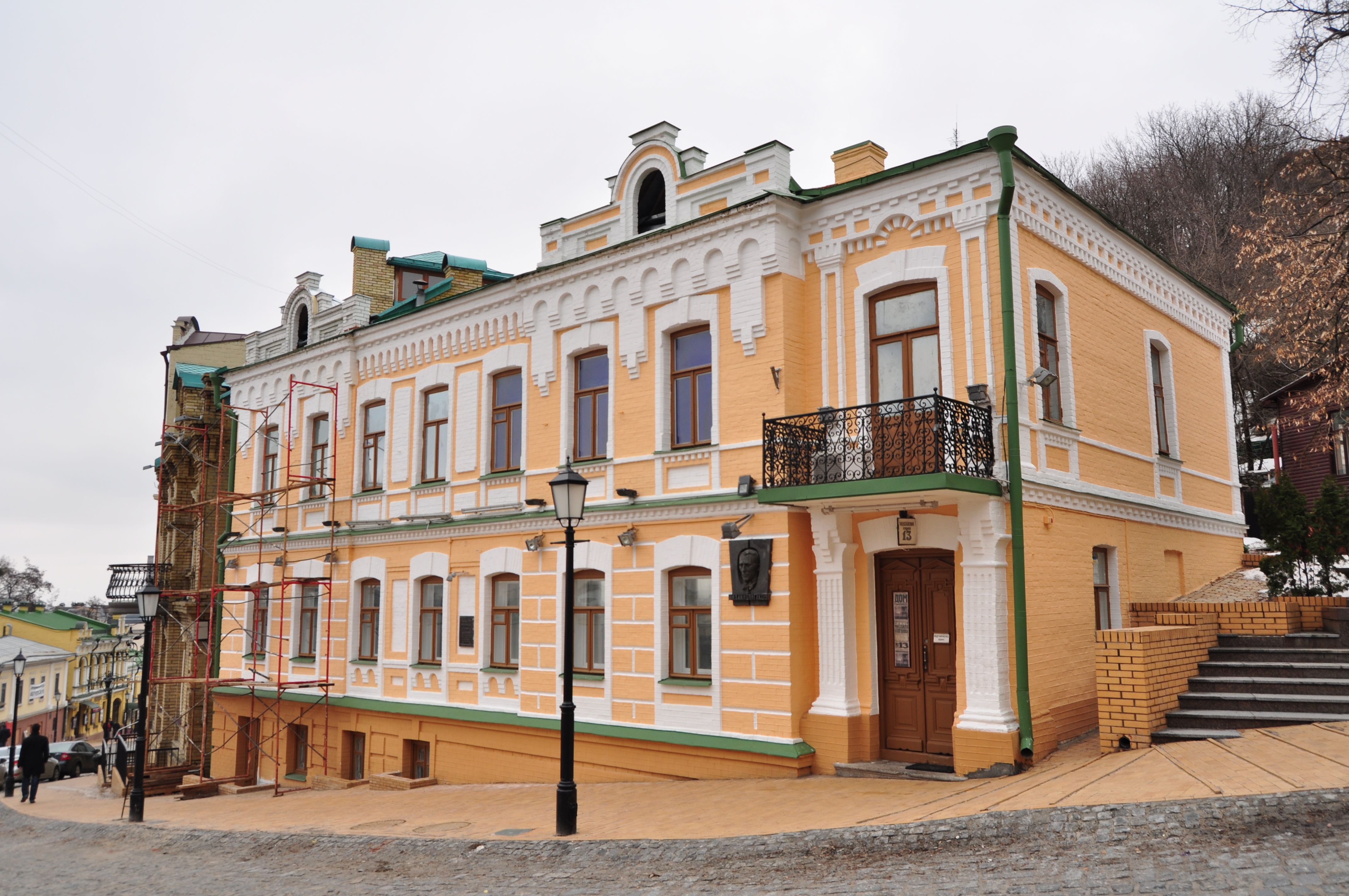 Будинок житловий, в якому у 1906—1922 рр. мешкали М. О. Булгаков, радянський письменник; родина Булгакових; у 1906 р. О. А. Кошиць, композитор, хоровий диригент; В. П. Листовничий, цивільний інженер, архітектор, Київ, Андріївський узвіз, 13